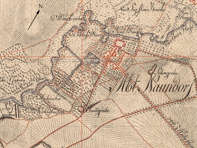 Karte von Abtnaundorf um 1800 (Ausschnitt aus Meilenblätter von Sachsen 1780-1806)